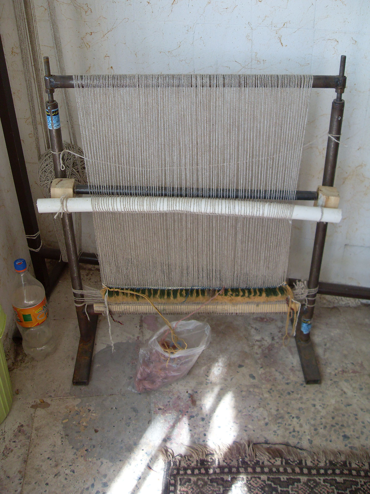 دار قالی